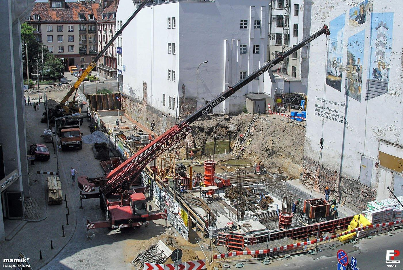 Widok z budynku NBP